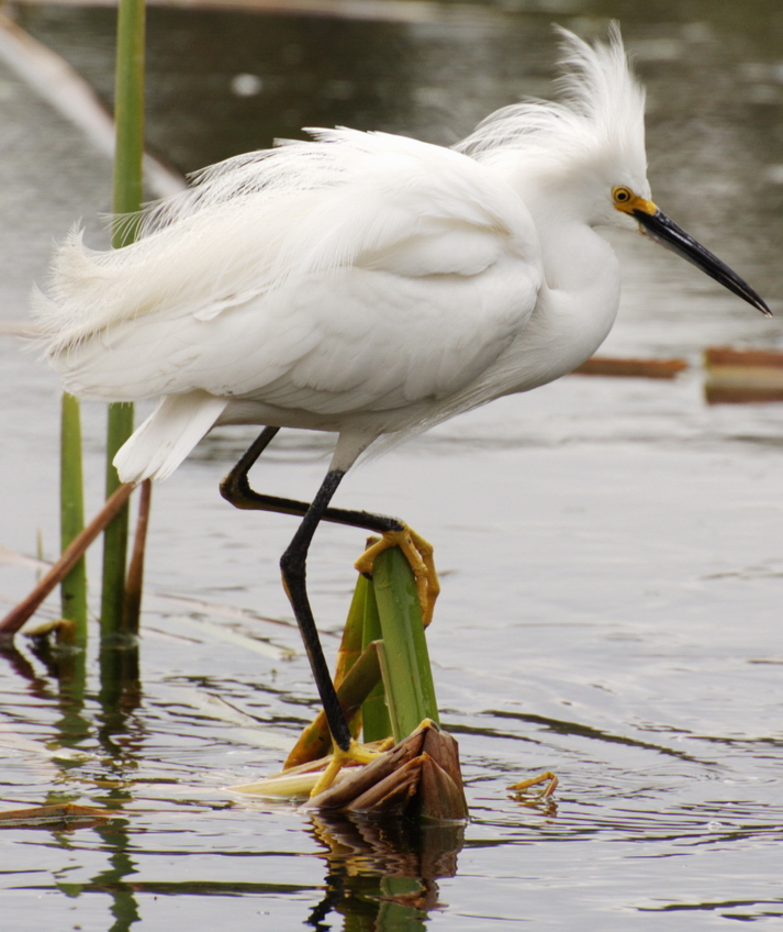 Egretta_thula_GARCITA_BLANCA